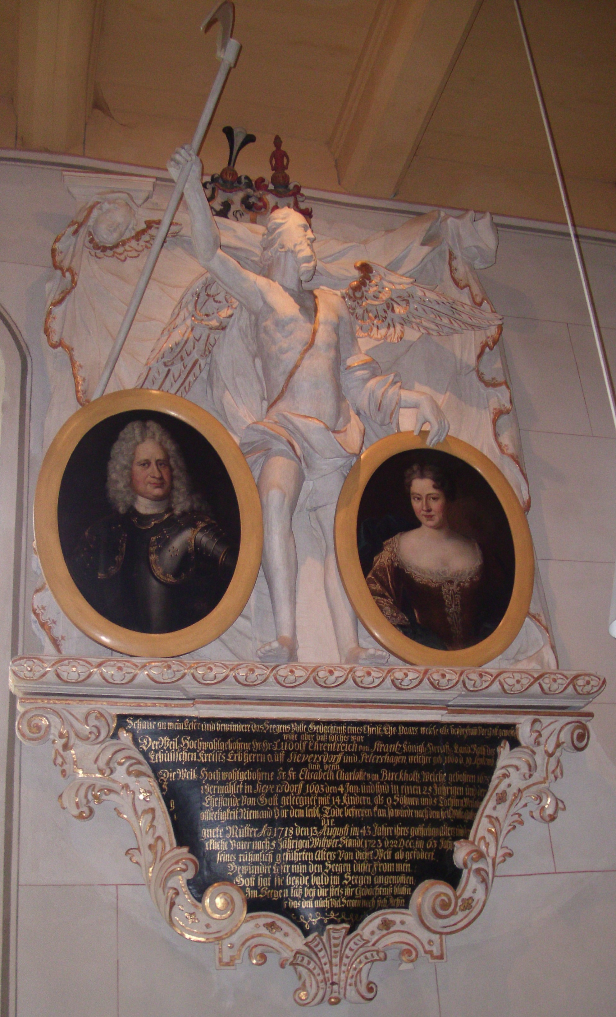 Ludolf Ehrentreich von Strantz (*1660, +1723), Landmarschall und Landrat von Lebus, Erbherr auf Sieversdorf und Elisabeth Charlotte von Strantz, geb. Birckholz (*1675, +1718). Gedächtnistafel, Sieversdorfer Kirche